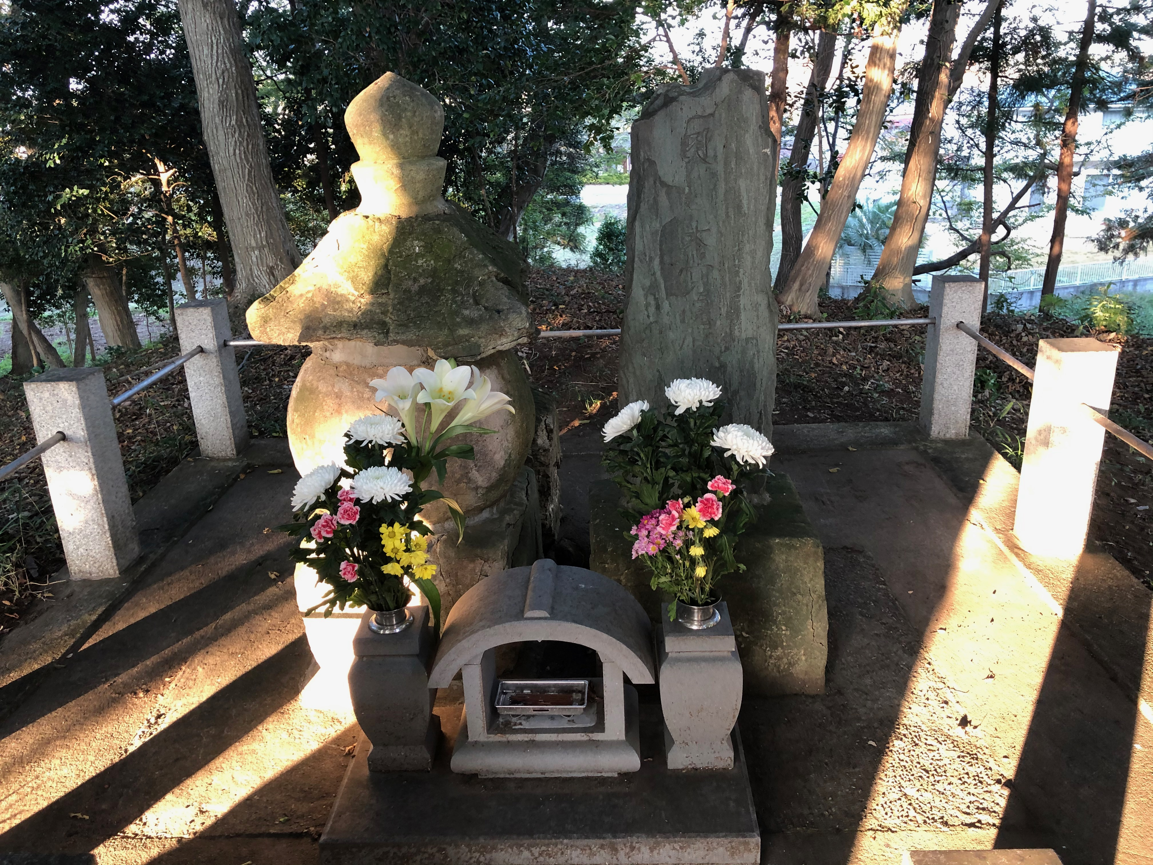 赤岩山光恩寺、赤井照光の墓（正面）